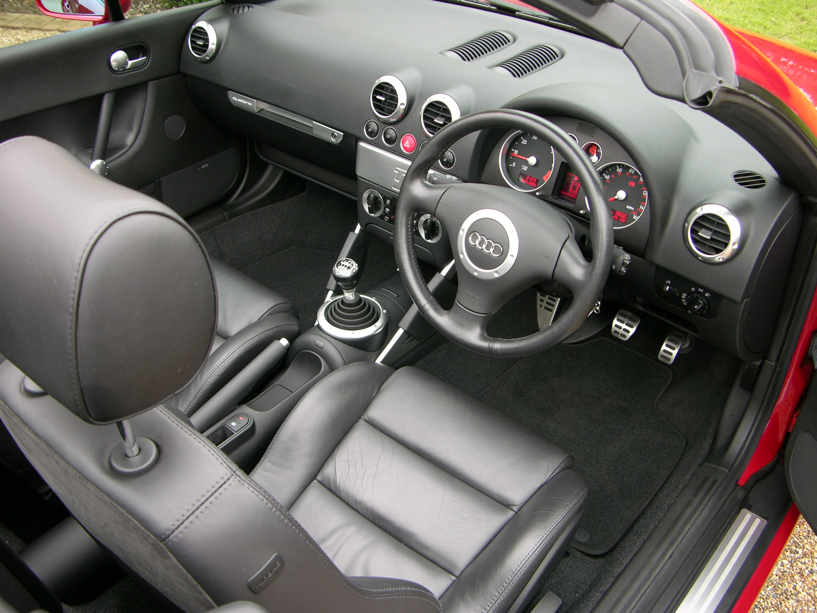 Audi TT 225 Roadster 2001 Misano Red